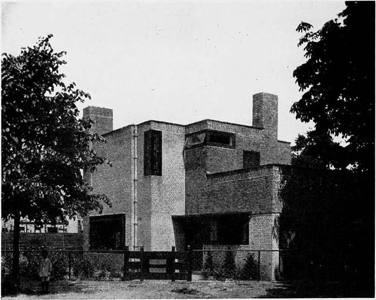 J.B. van Loghem (architect). Stadswoning 't Fort, (Frederik van Eedenlaan) iordensstraat 77, Haarlem. 1922-1923. Foto afkomstig uit Bouwkundig Weekblad, 45e jaargang, nummer 38 (20 september 1924): p. 366.